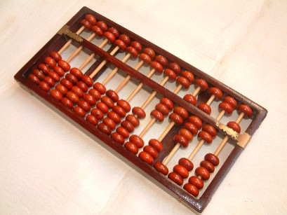 Abacus